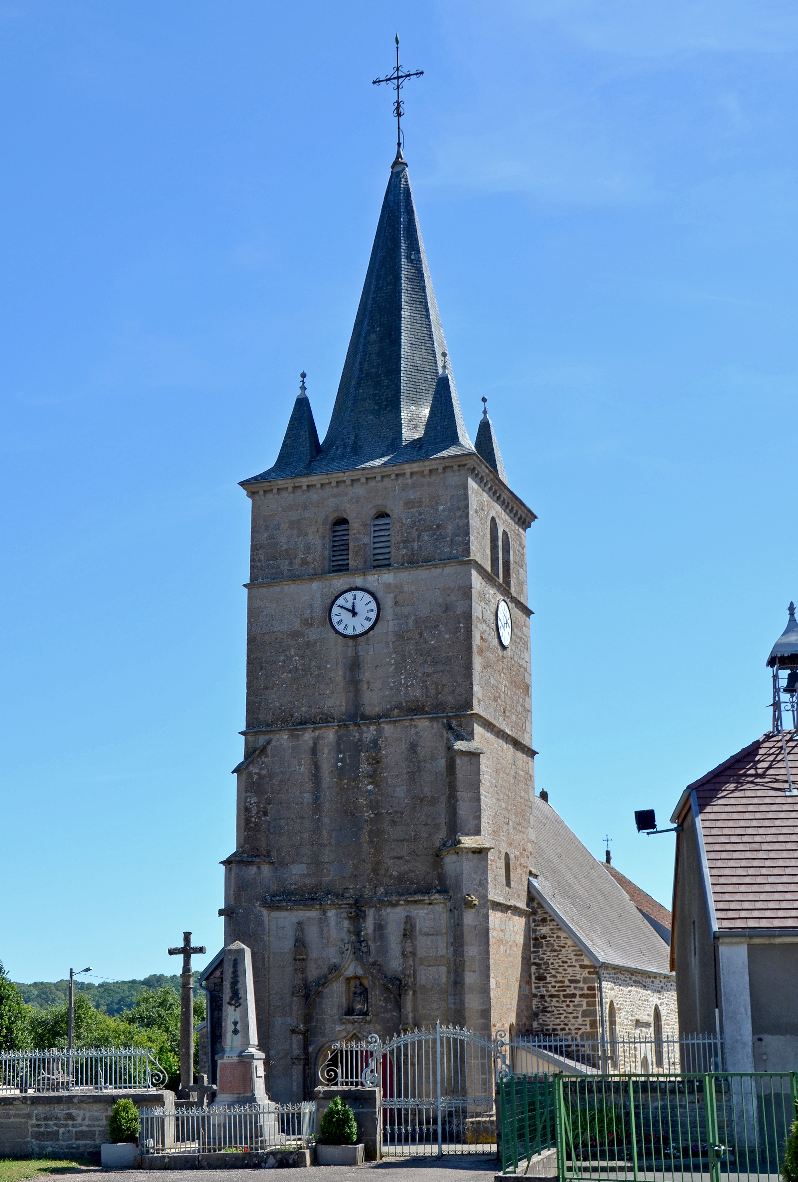 Église de Heuilley-Cotton, Haute-Marne, Chapagne-Ardennes, France